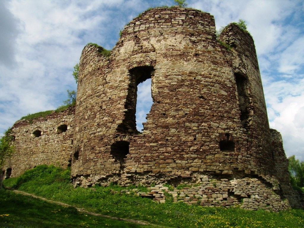 Замок, Бучач, вул. Замкова